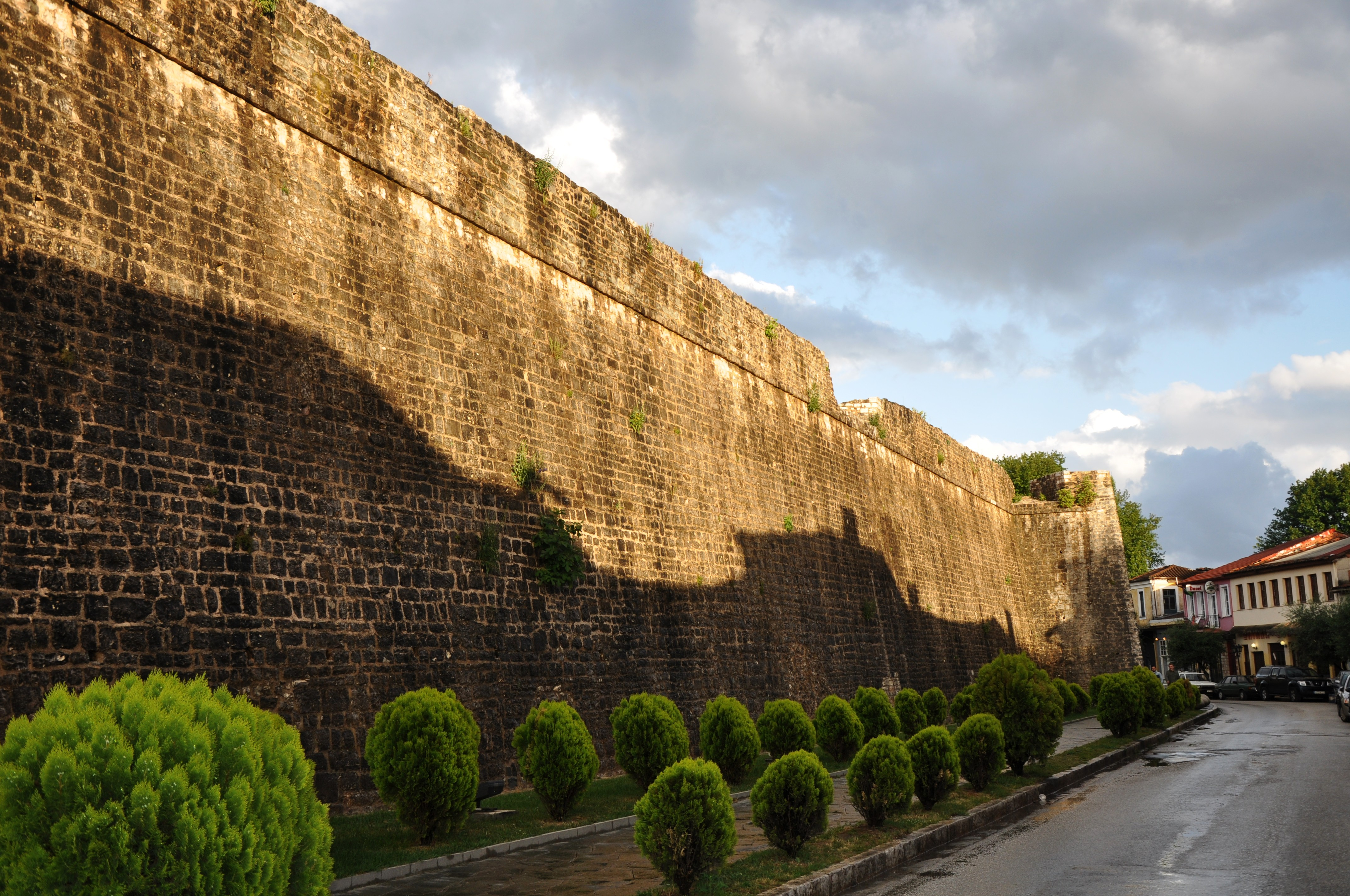 Κάστρο Ιωαννίνων«Κάστρο Ιωαννίνων»